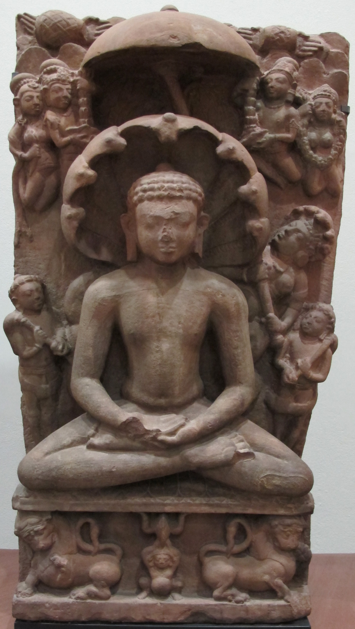 India, madhya pradesh, jina parshvanatha dalla tempèesta, 600-700